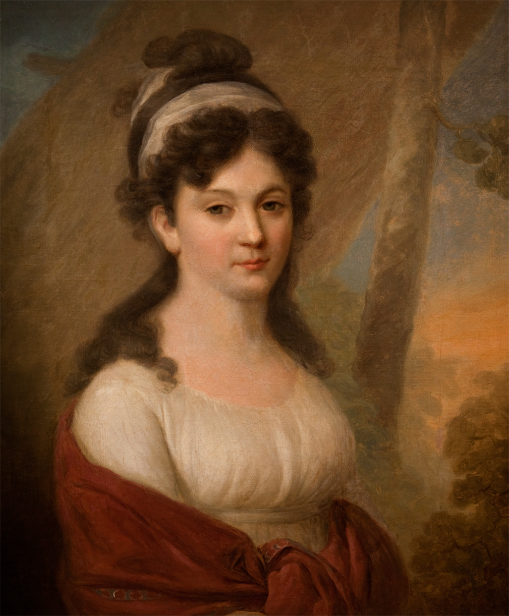 Екатерина Львовна Тютчева, урожденная Толстая (1776-1866), мать поэта.